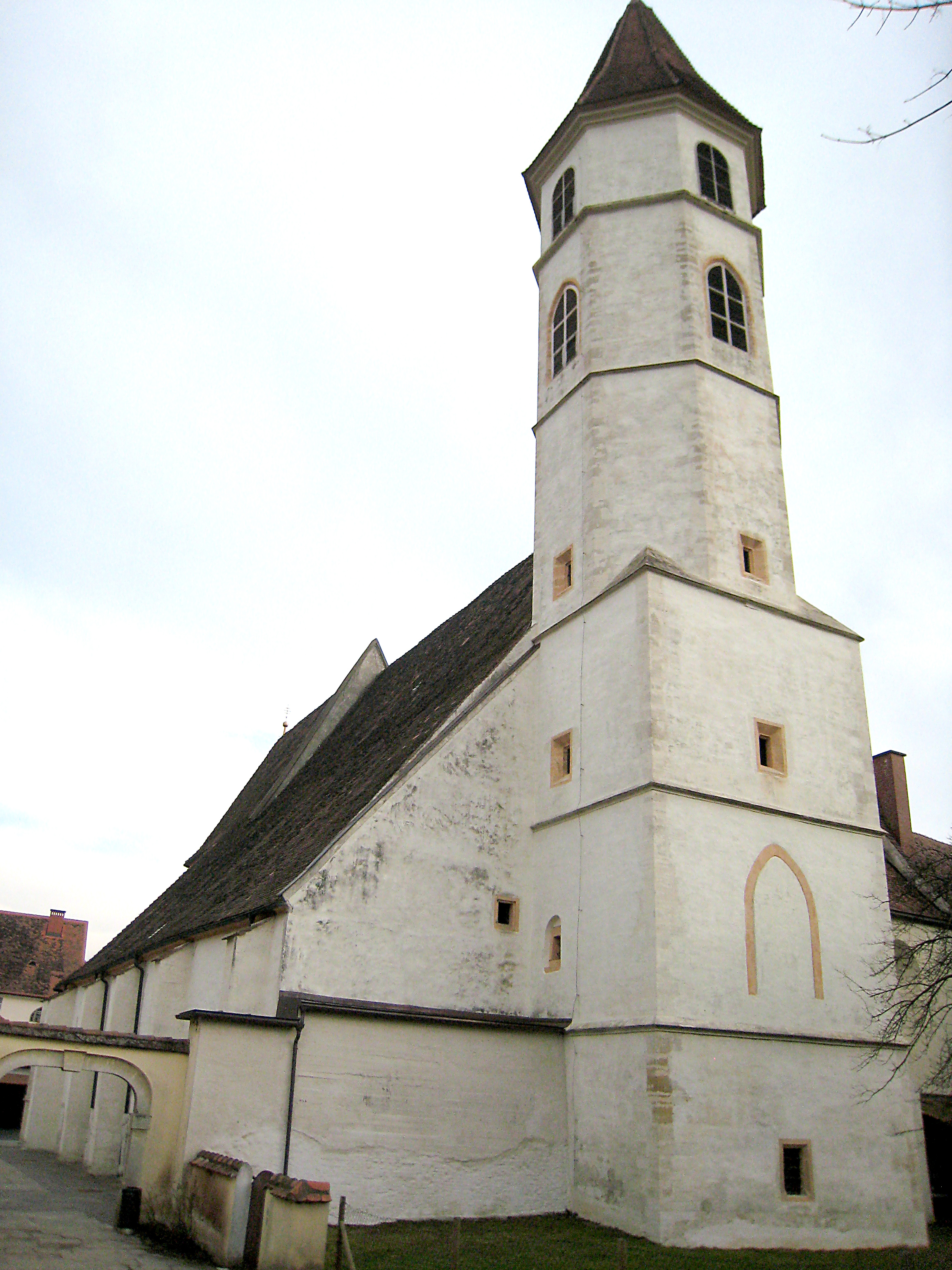 Kath. Pfarrkirche hl. Johannes der Täufer